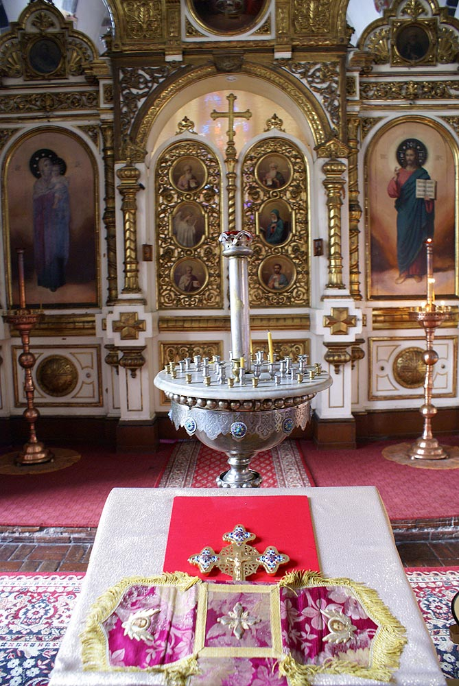 Wrocław Stare Miasto, ul. Świętego Mikołaja 40 - dawny kościół św. Barbary, obecnie prawosławna cerkiew katedralna p.w. Narodzenia Przenajświętszej Bogurodzicy (zabytek nr 288/15)